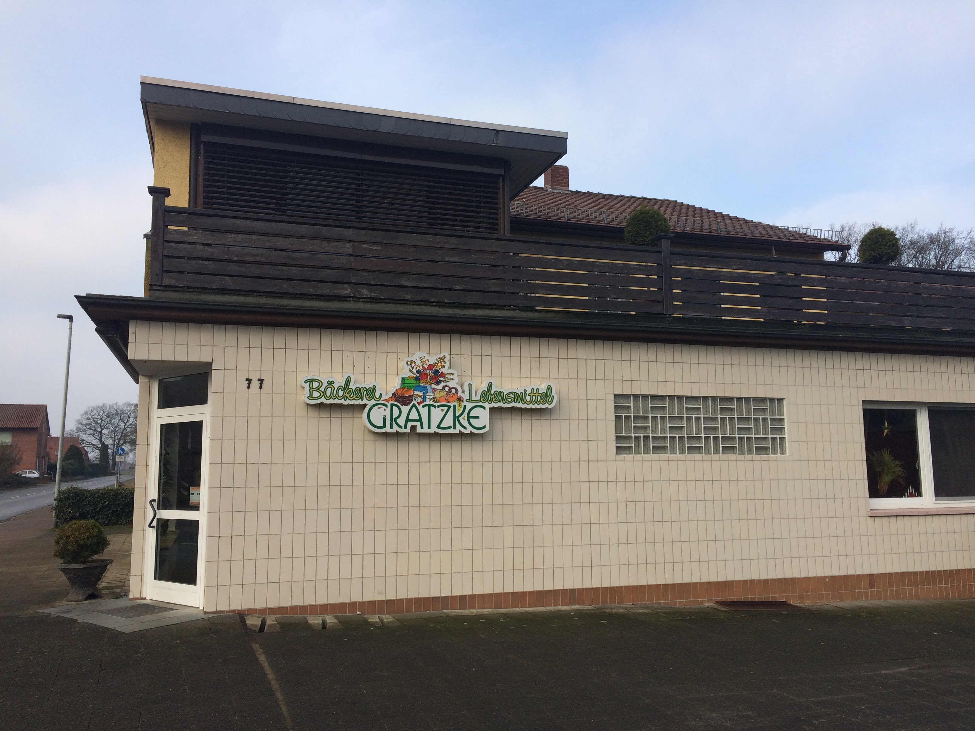 Bäckerei Gratzke